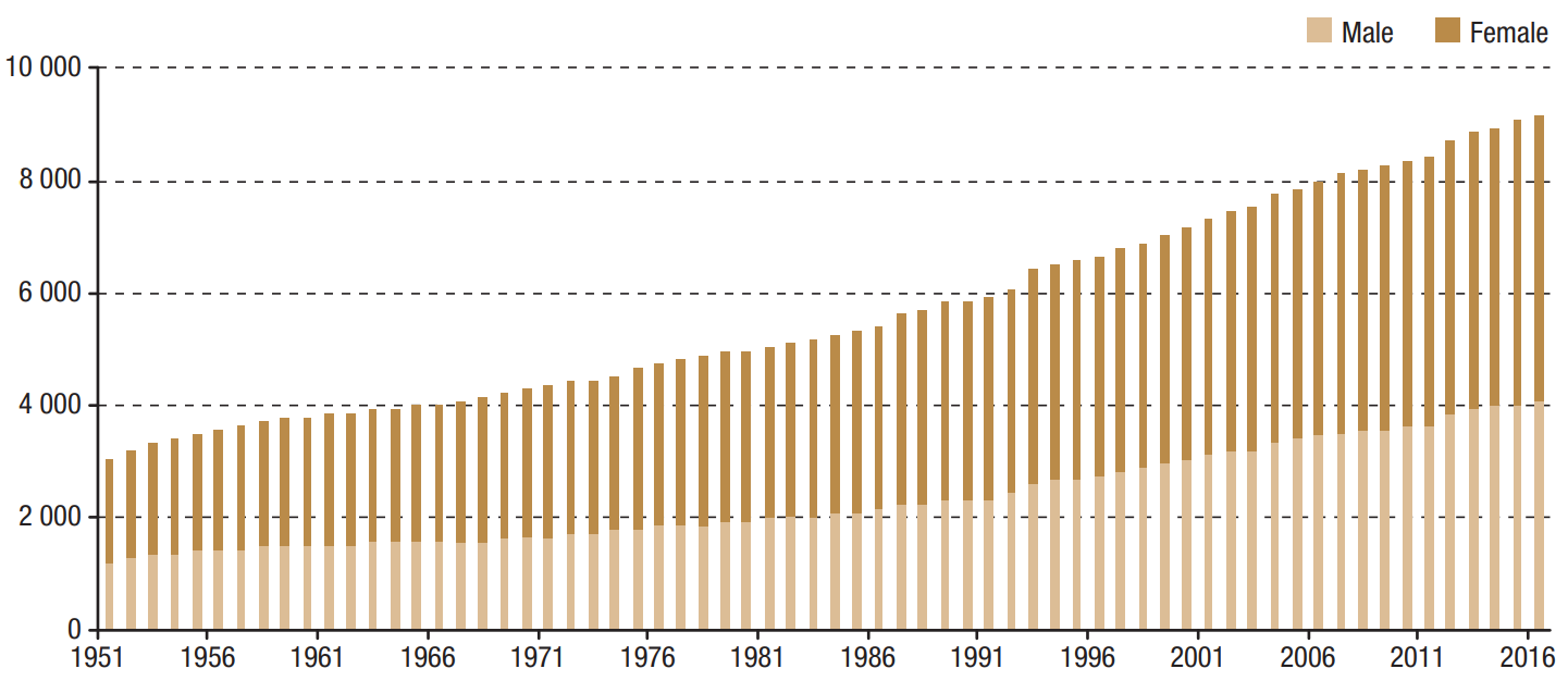 Динамика численности монегасков 1951-2016